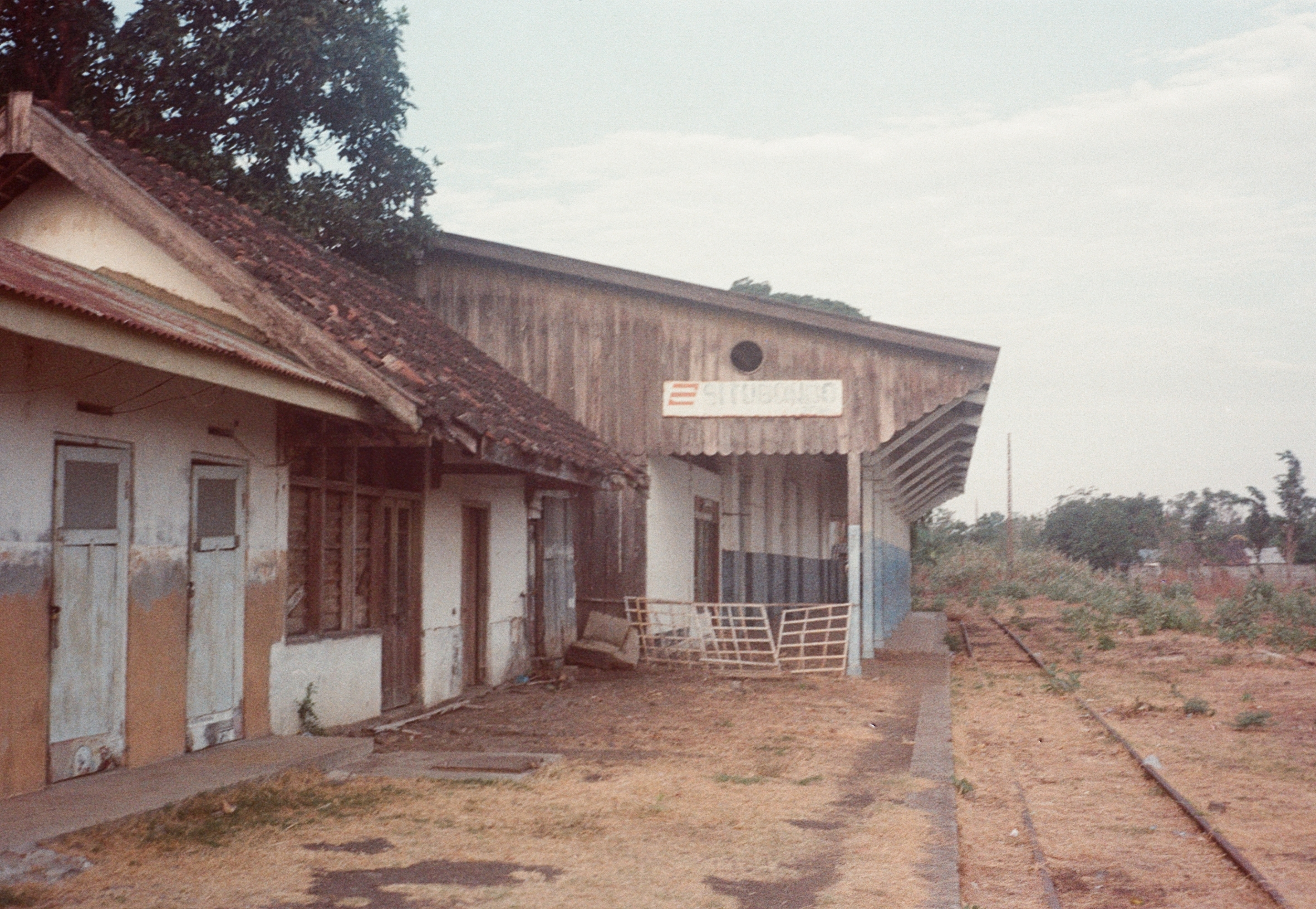 Stasiun Situbondo difoto menggunakan Kamera Film